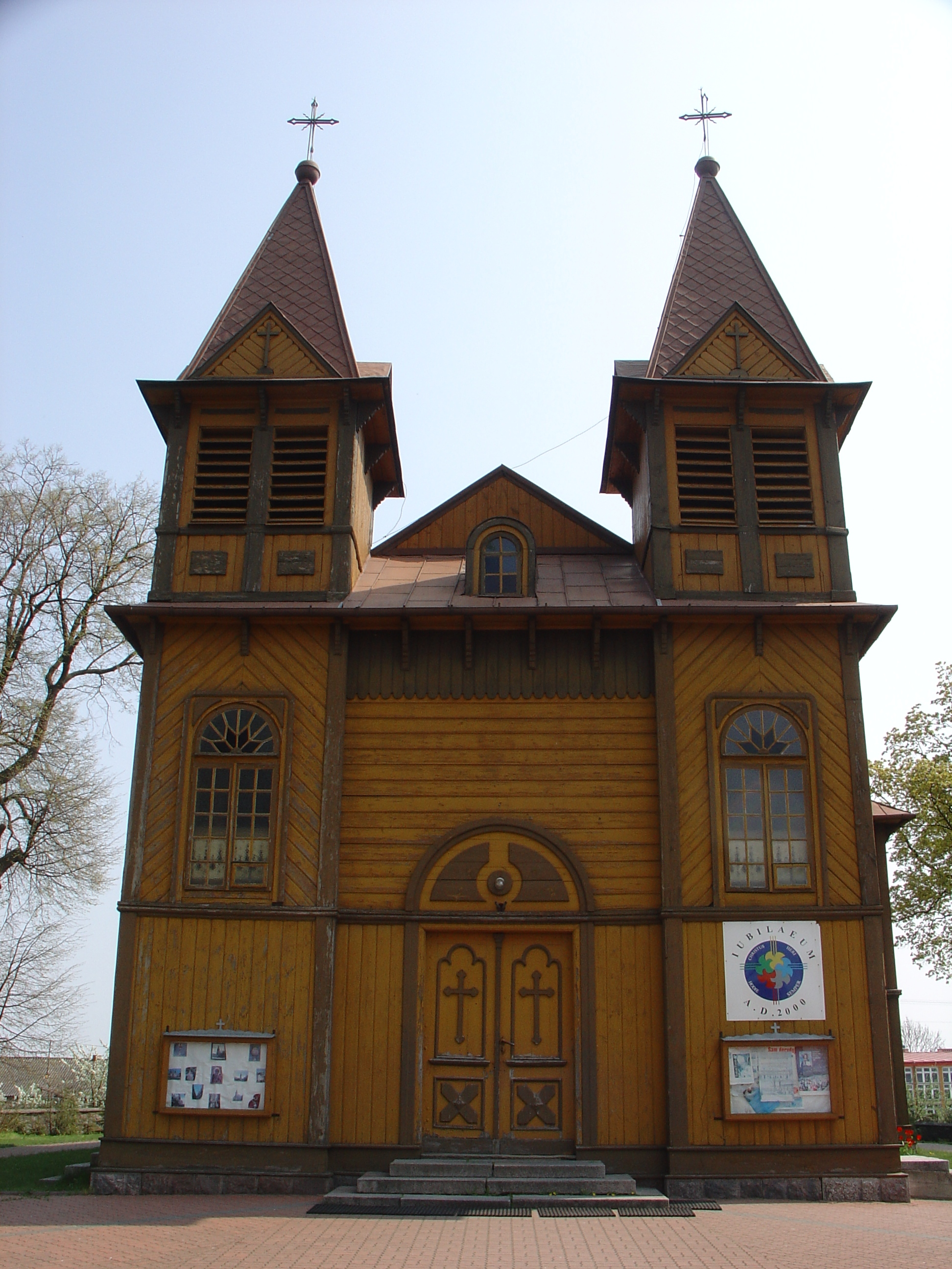 Kościół pw. św. Bartłomieja w Paprotni